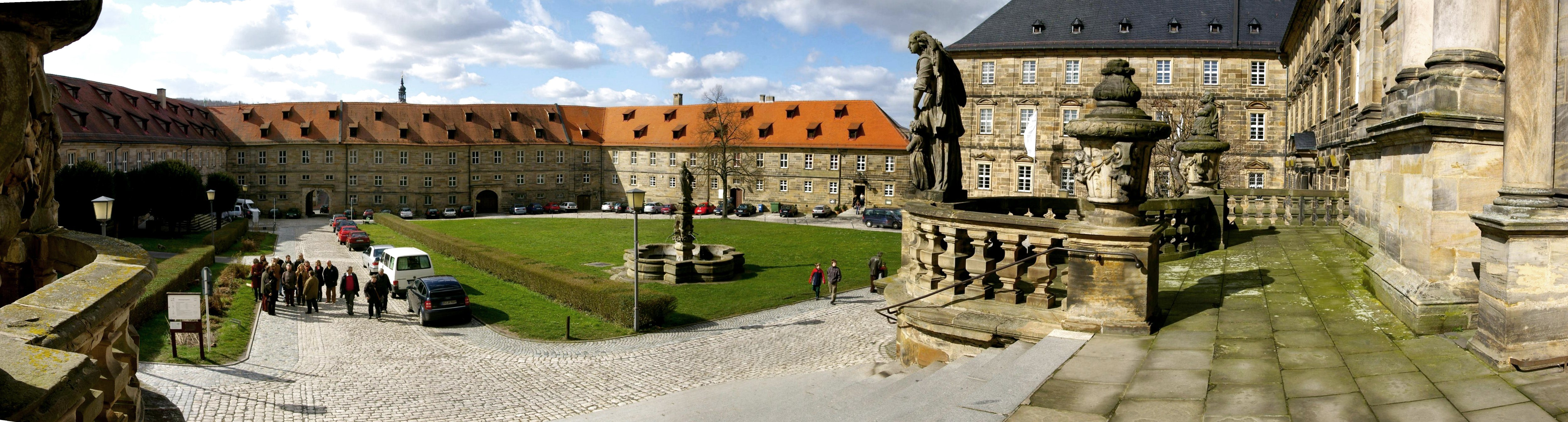 Bamberg - Kloster Michaelsberg - Parkanlage vpr Klosterkirche